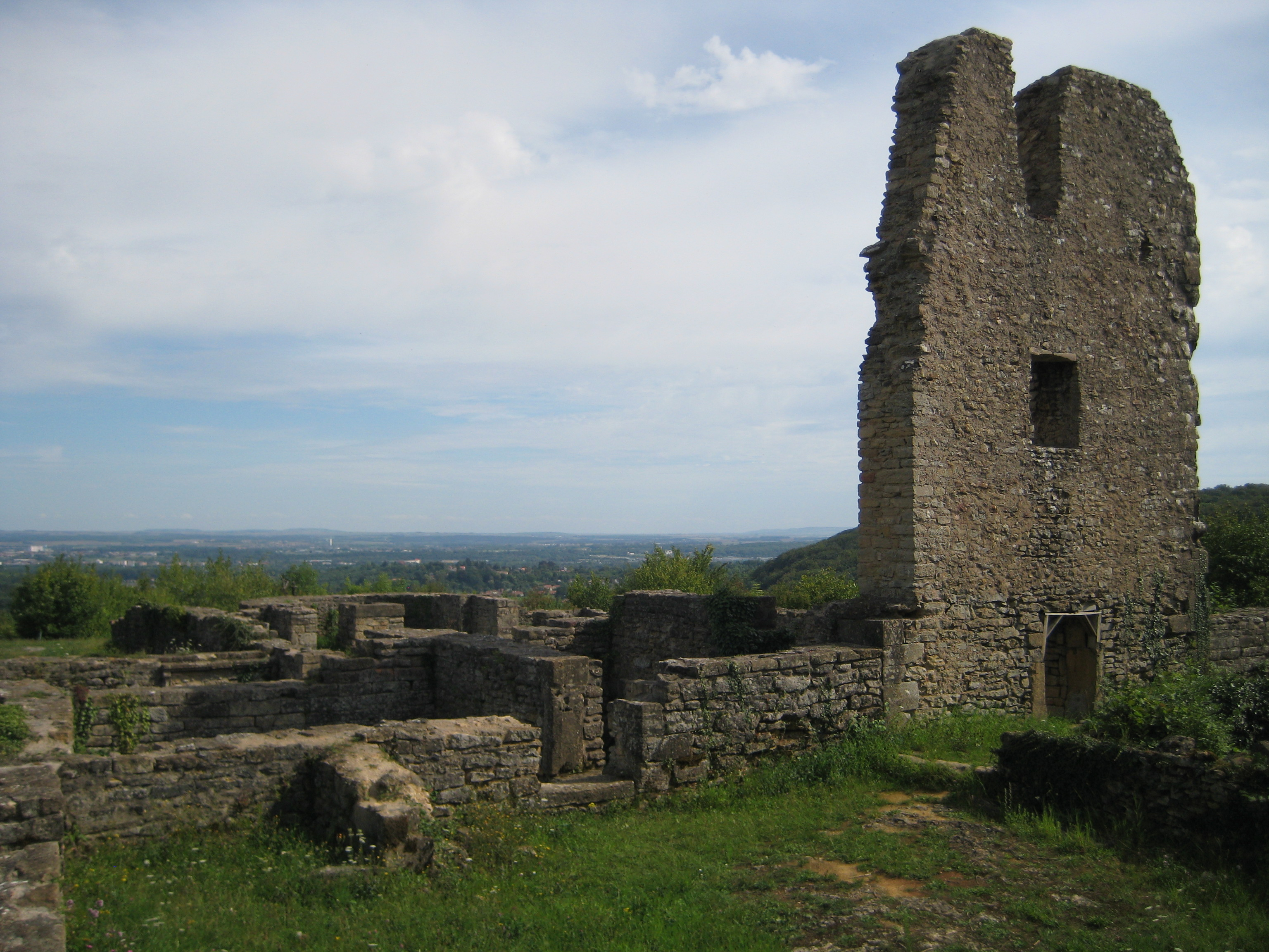 Description prieuré chatel saint germain Date25 August 2011Sourcemon appareil photoAuthorAimelaimePermission (Reusing this file) prieuré chatel saint germain